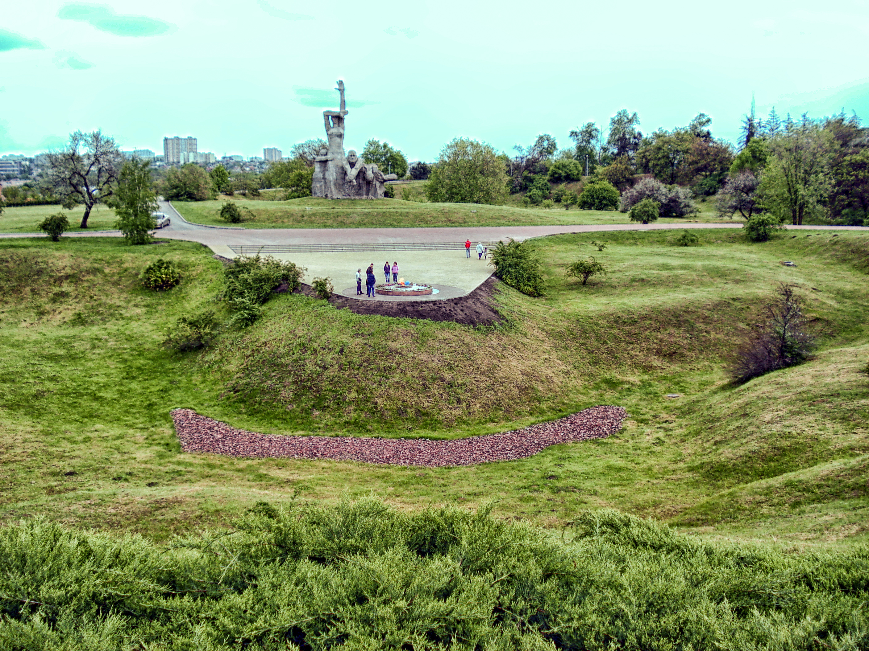 Место массовых расстрелов в период немецко-фашистской оккупации в 1942 г. "Змиевская балка": улица Доватора, Ростов-на-Дону, Ростовская область